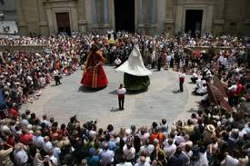 Ball dels Comtes d'Osona durant el Seguici de Sant Miquel (Festa Major de la Ciutat).